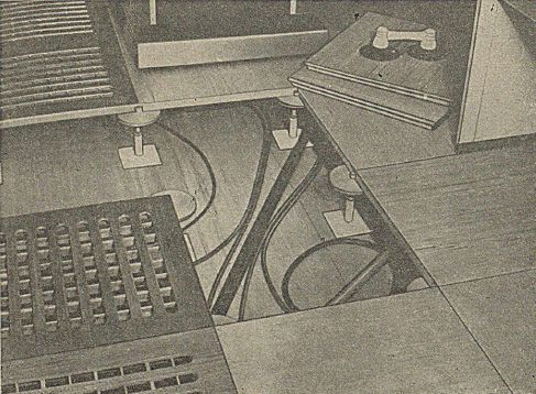 Podłogi segmentowe w halach komputerowych.